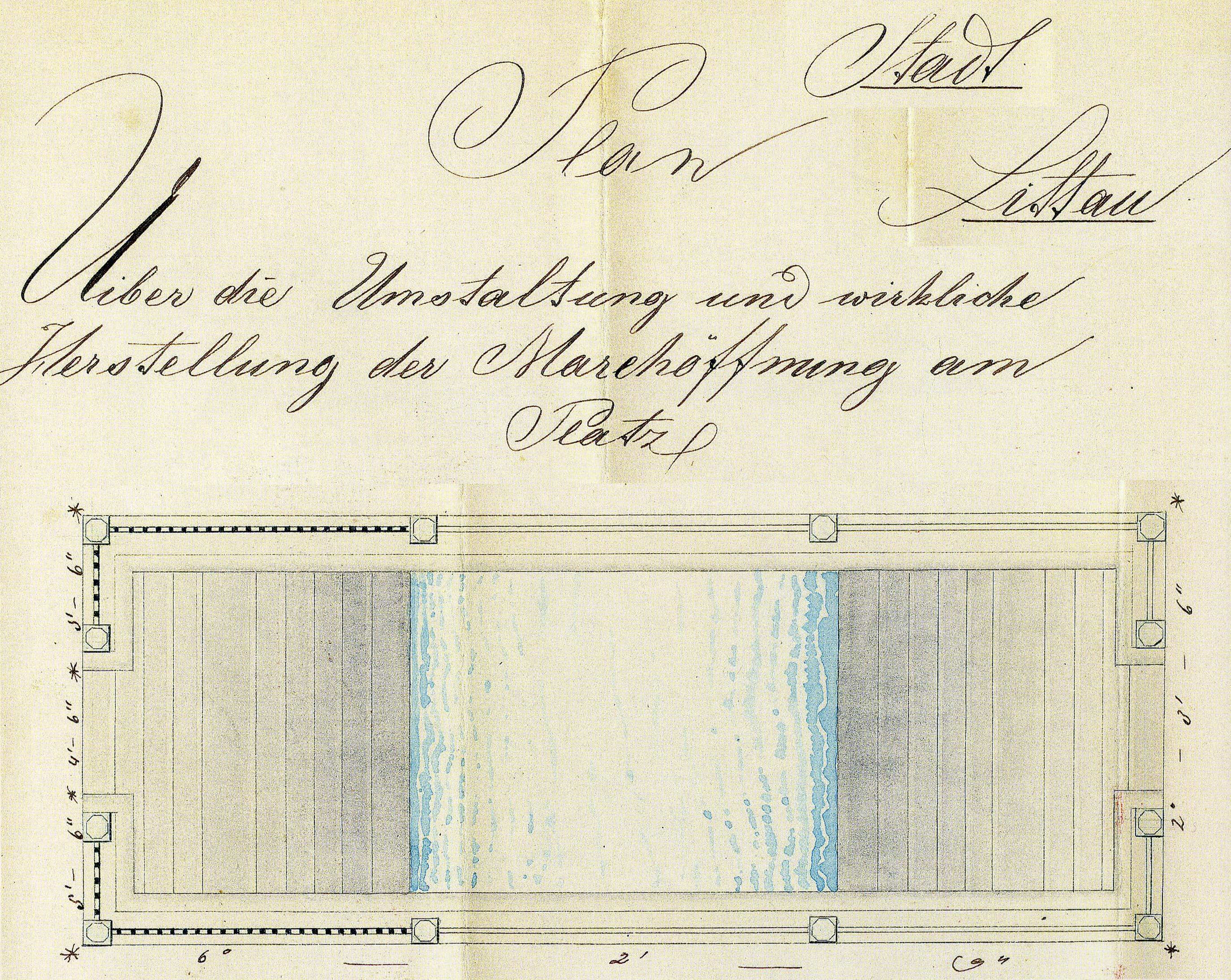 Plán nově zřízeného schodiště k Nečízu, pohled shora This file was uploaded during the project of WikiTown Litovel.